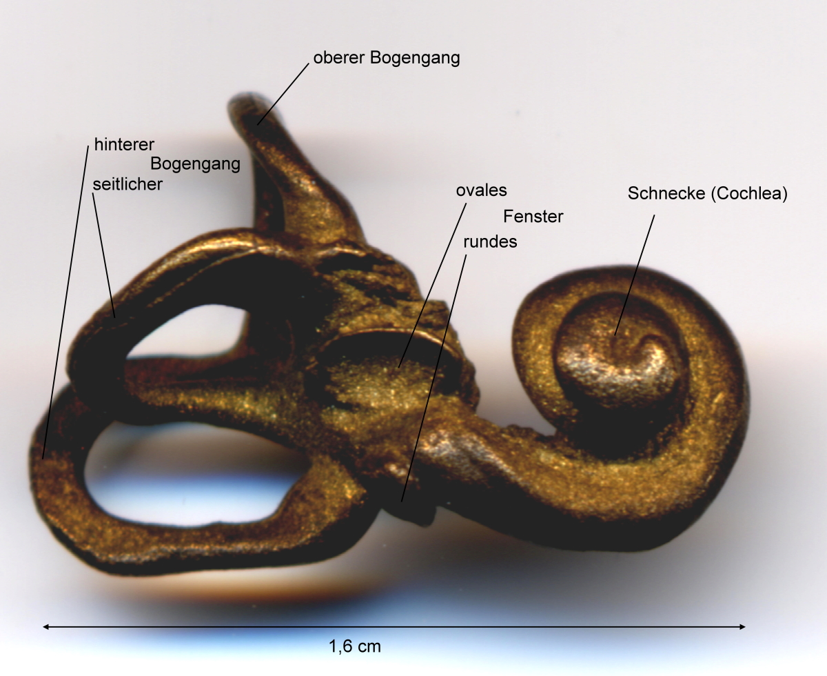 menschliches Labyrinth (Ausguss)